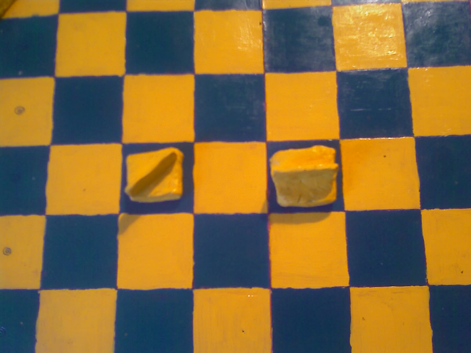 Subditos